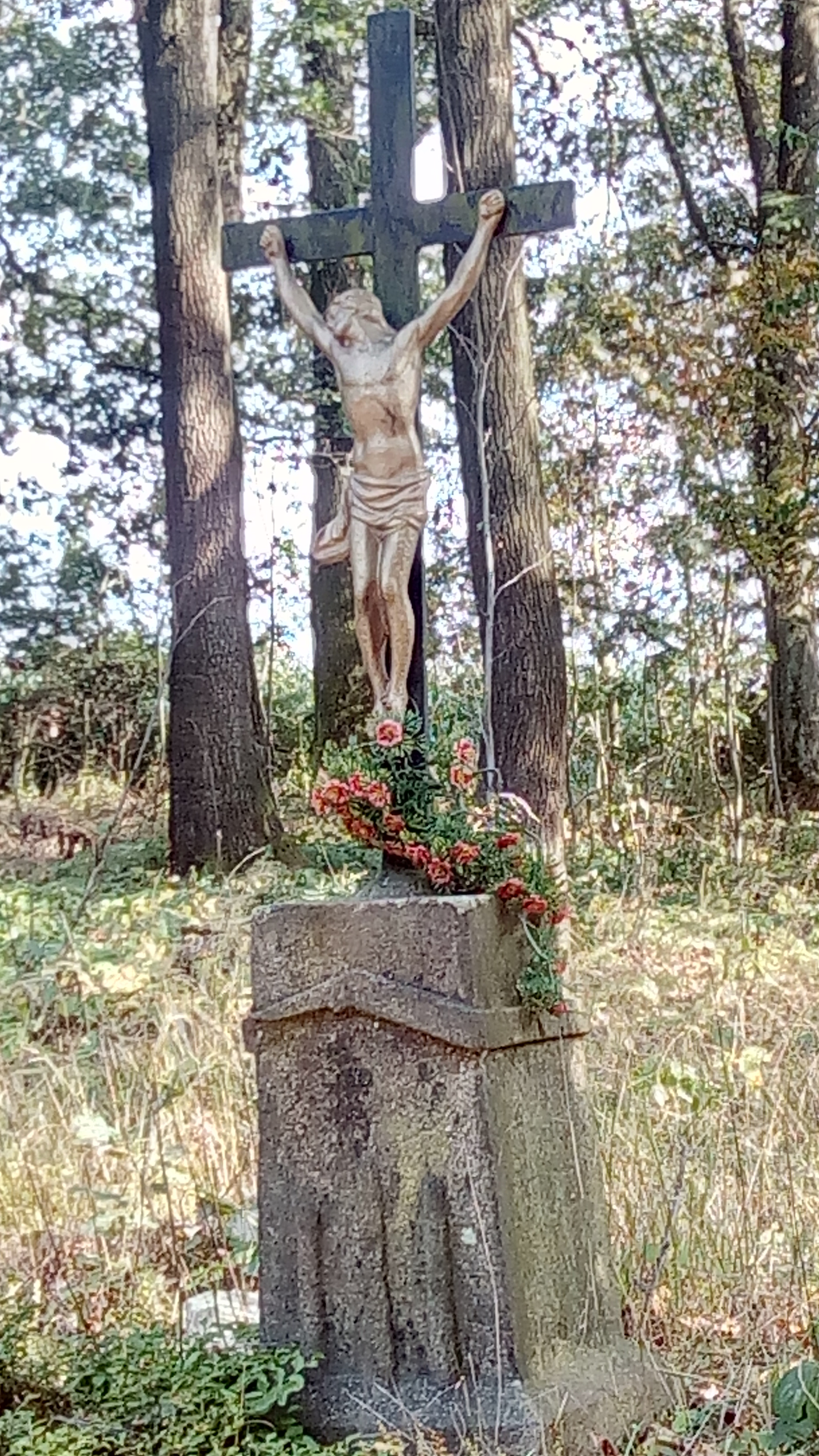 Autor fotografie Jiří Zelenka. Křížek u silnice č.19 u lesní cesty Herlify Bartoušov. Okr.Havlíčkův Brod. Kraj Vysočina. Czech Republic.